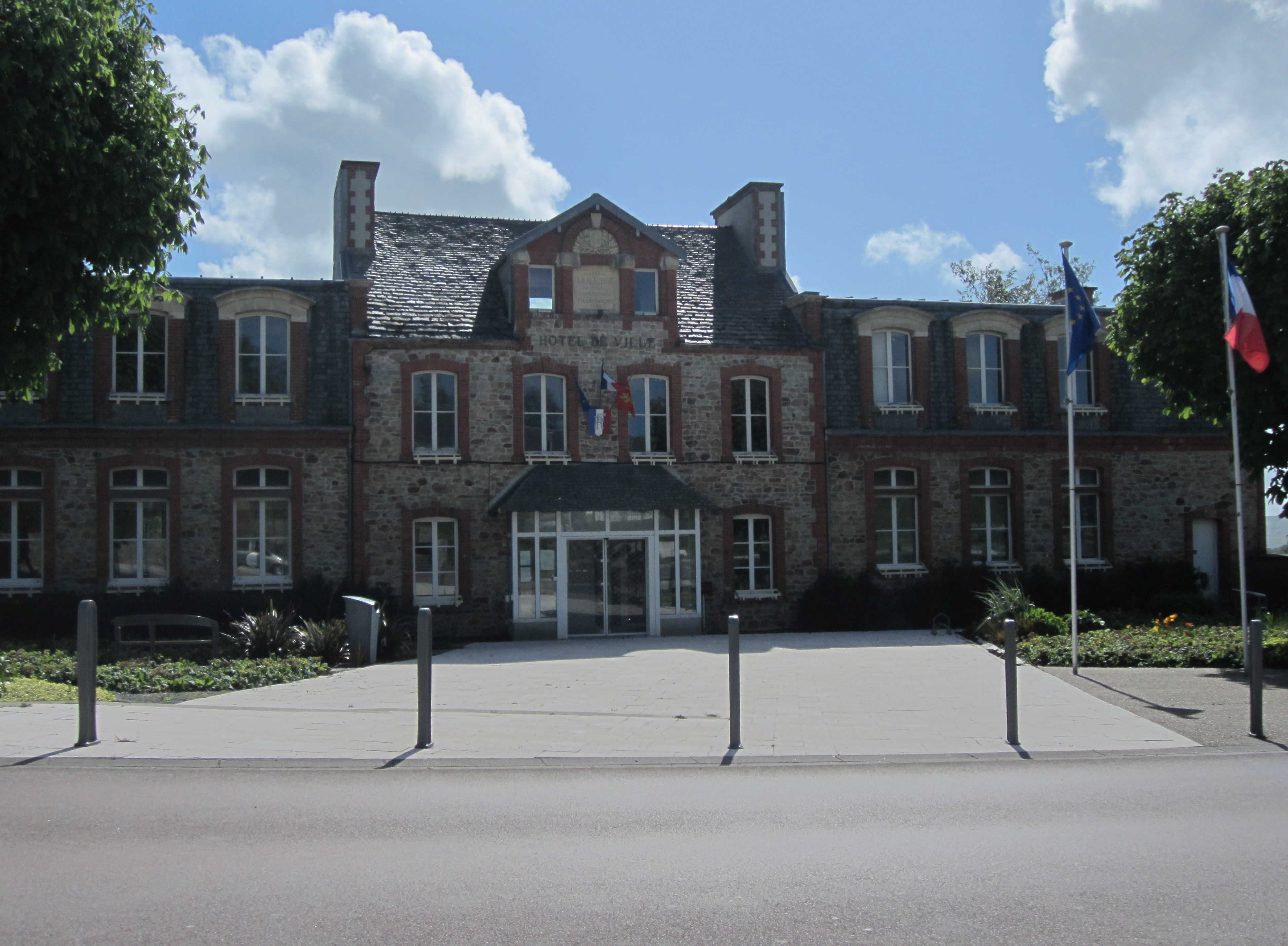 la Glacerie, Manche